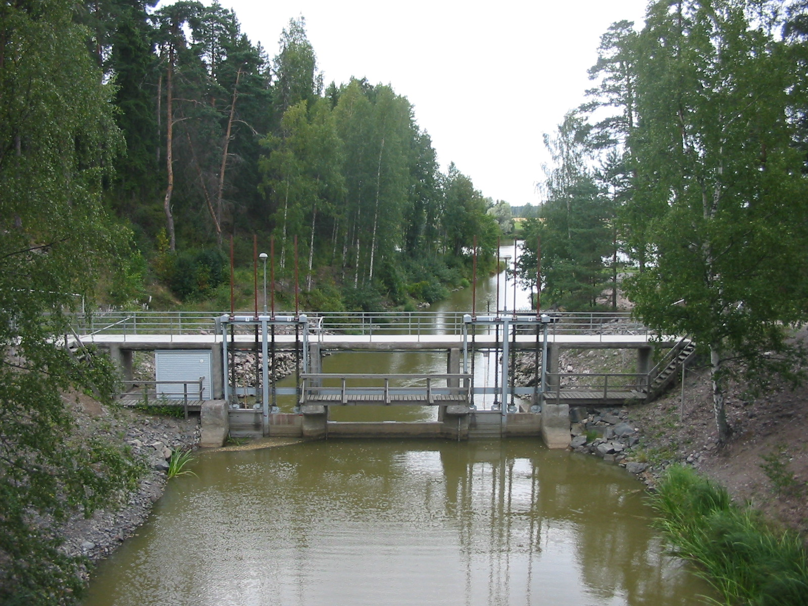 Hovirinnankosken säännöstelypato Paimionjoessa Someron Pitkäjärvellä nähtynä Hovirinnan sillalta. Pato on rakennettiin vuonna 1965 tarkoituksena säännöstellä Paimionjoen yläpuolista järvialuetta Turun kaupungin vedensaannin turvaamiseksi. Pato peruskorjattiin vuonna 2003 jolloin siitä tuli myös kauko-ohjauksella toimiva.